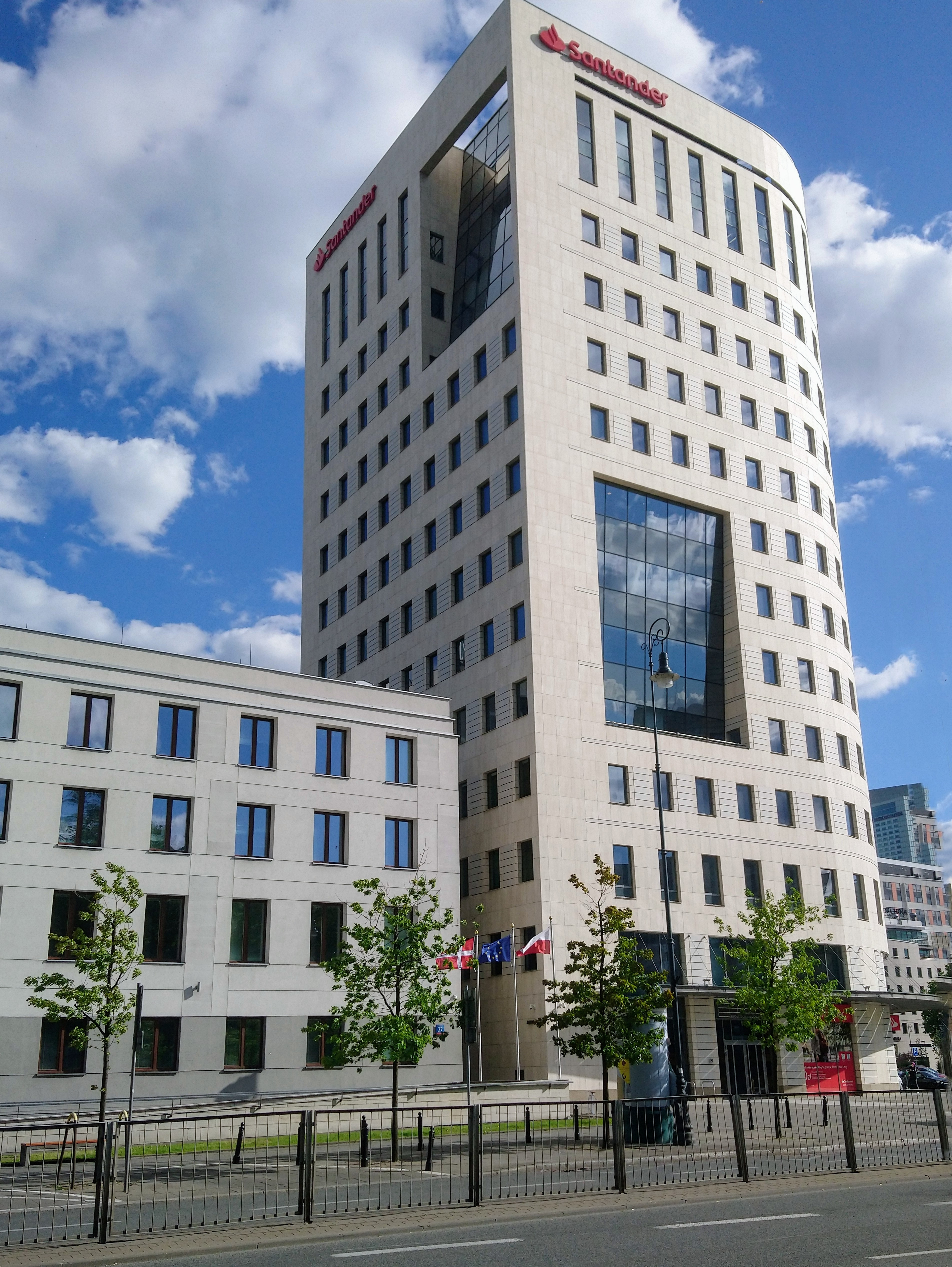 Embassy of Denmark in Poland